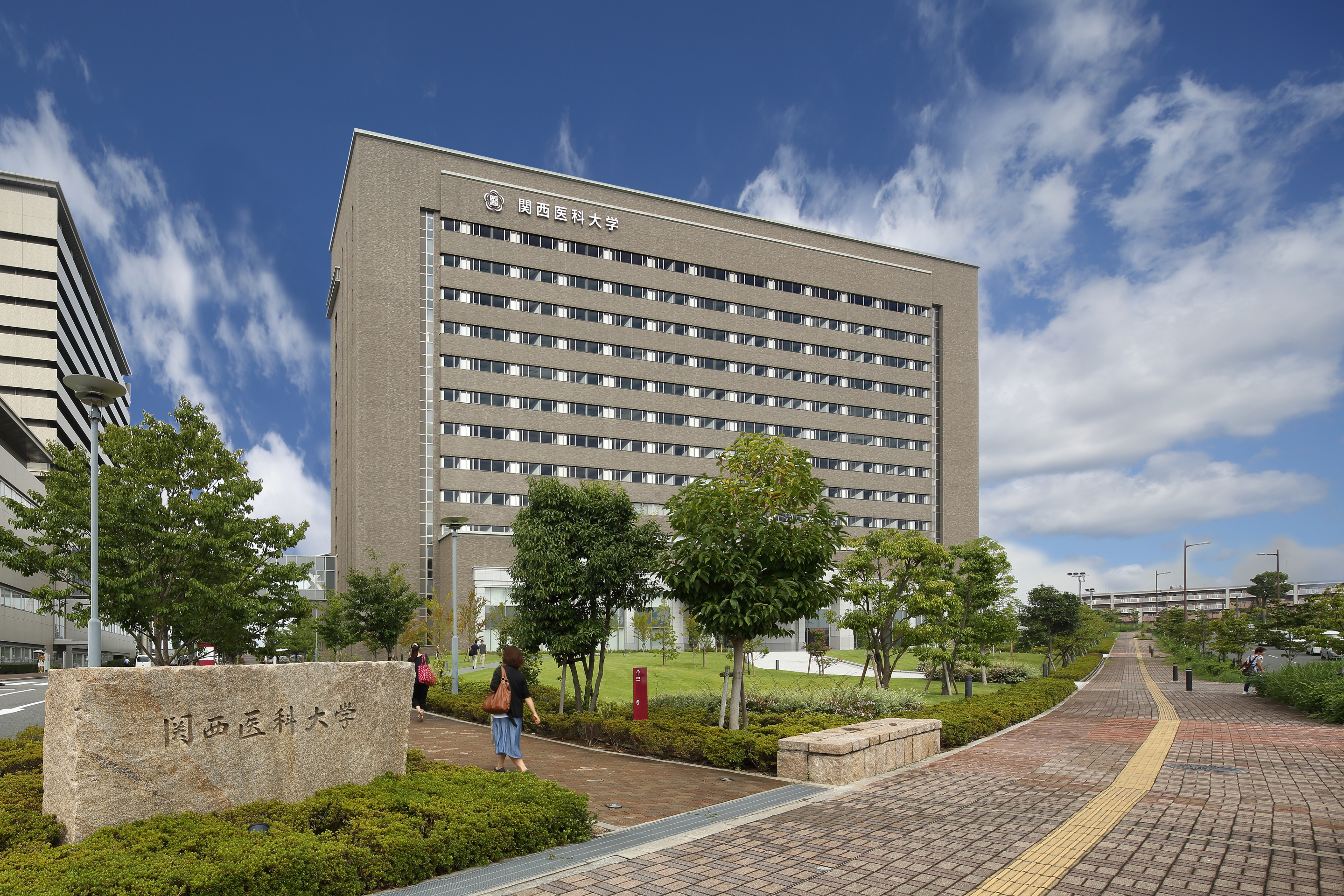 学校法人学校法人関西医科大学の正門と枚方学舎。